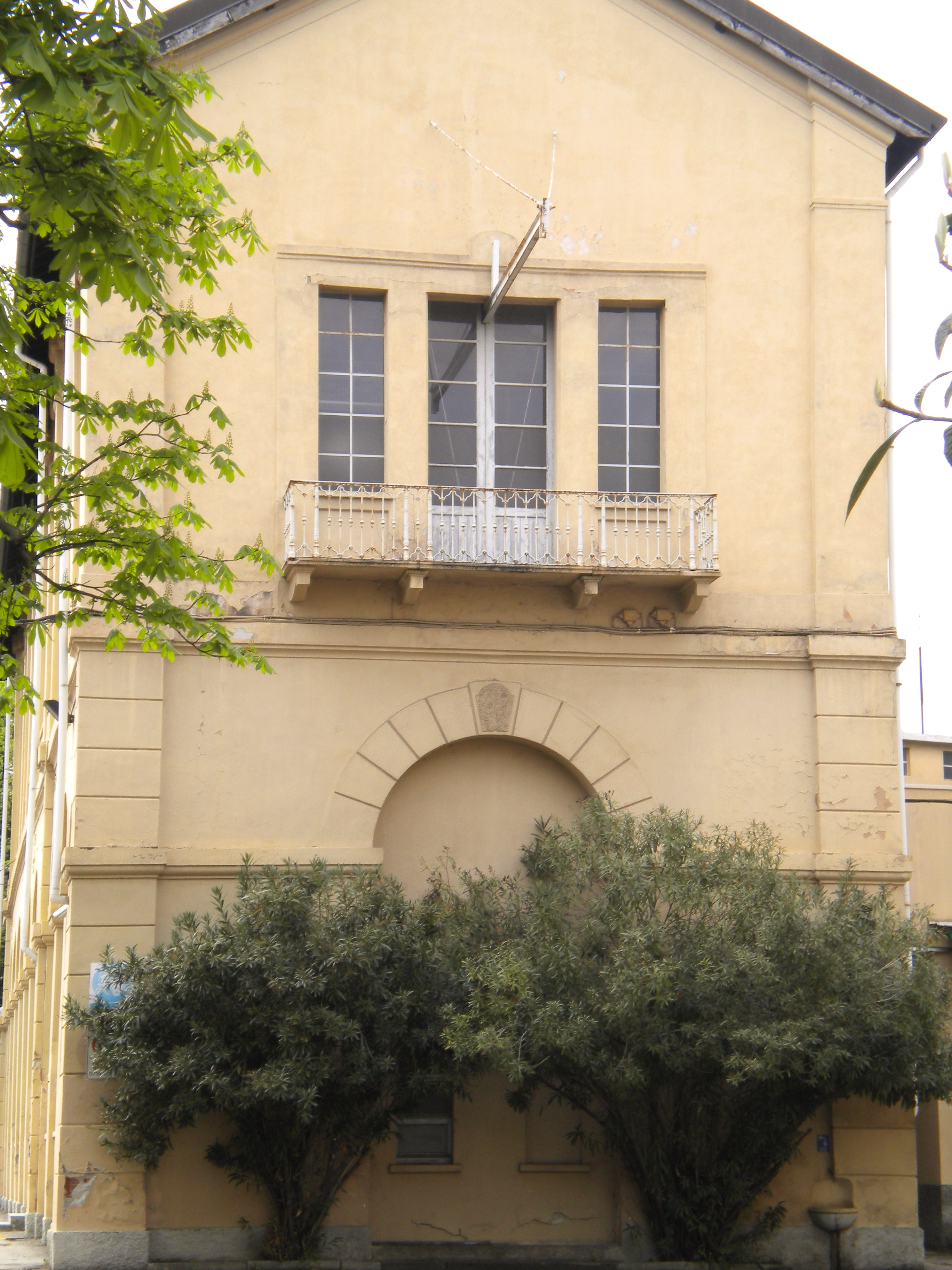 Arco rinascimentale sulla facciata del convitto della Manifattura di Legnano